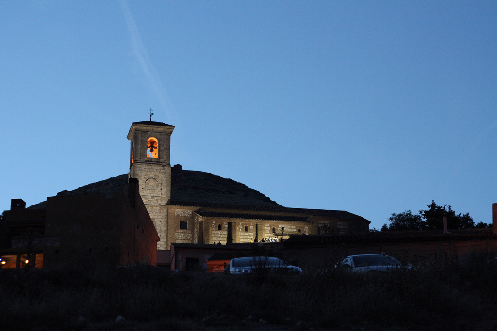 Iglesia de San Juan Bautista en Hita